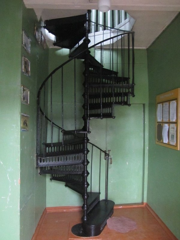 Трокенікі 1. Сядзібны дом